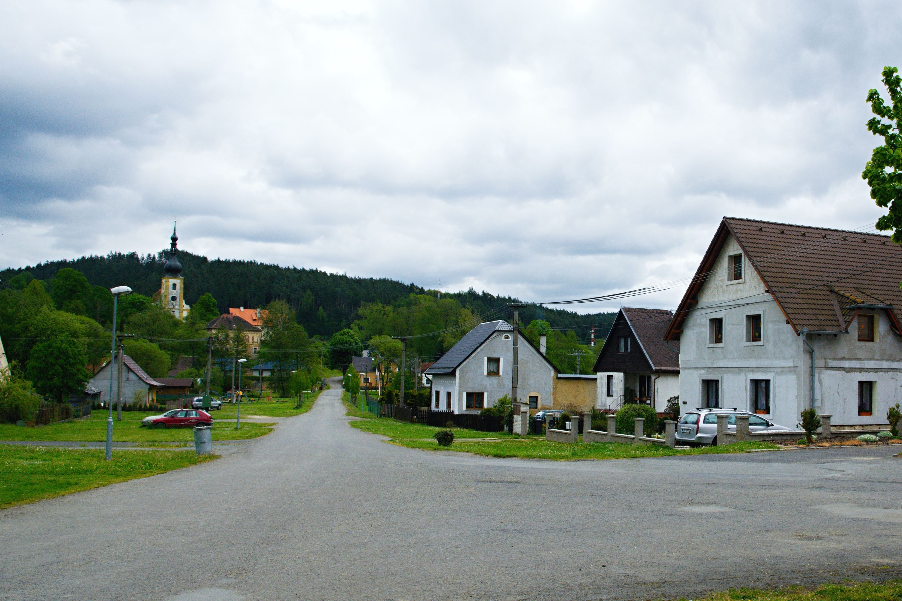 Brod nad Tichou - náves, v pozadí pohled na kostel a faru